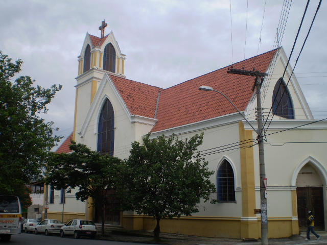 Igreja de São Geraldo, Bairro São Geraldo, Belo Horizonte, Minas Gerais, Brasil.